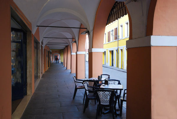 Castel Goffredo, i portici di Via Roma.